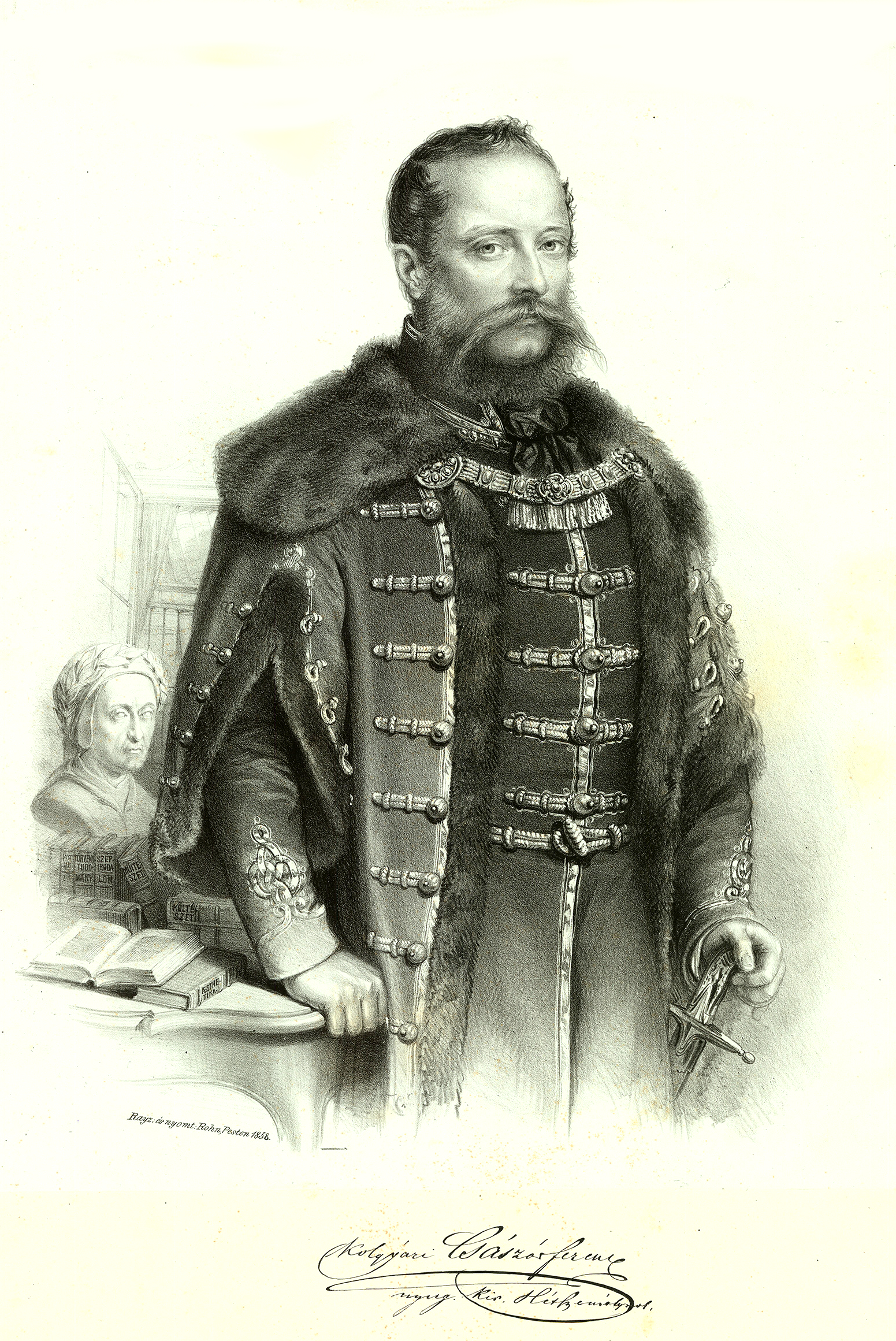 Kolgyári Császár Ferenc (Zalaegerszeg, 1807. július 9. – Kerepes, 1858. augusztus 17.) jogász, költő, bencés szerzetes, a Magyar Tudományos Akadémia tagja.